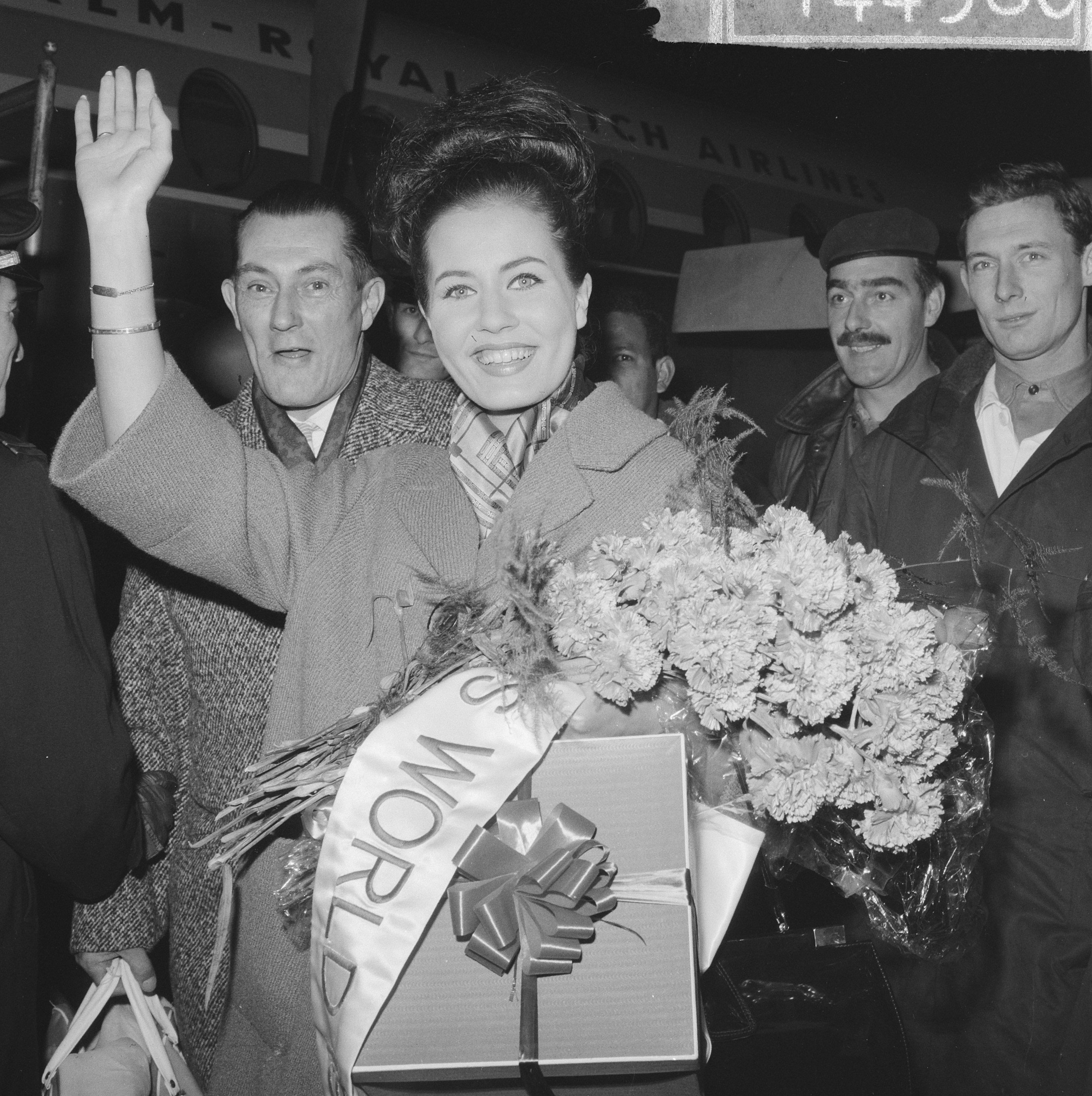 Collectie / Archief : Fotocollectie Anefo Reportage / Serie : [ onbekend ] Beschrijving : Miss World Rina Lodders weer thuis met de prijs en zilveren globe Datum : 10 november 1962 Trefwoorden : missen Persoonsnaam : Lodders, Rina Instellingsnaam : Miss World Fotograaf : Koch, Eric / Anefo Auteursrechthebbende : Nationaal Archief Materiaalsoort : Negatief (zwart/wit) Nummer archiefinventaris : bekijk toegang 2.24.01.03 Bestanddeelnummer : 914-4980